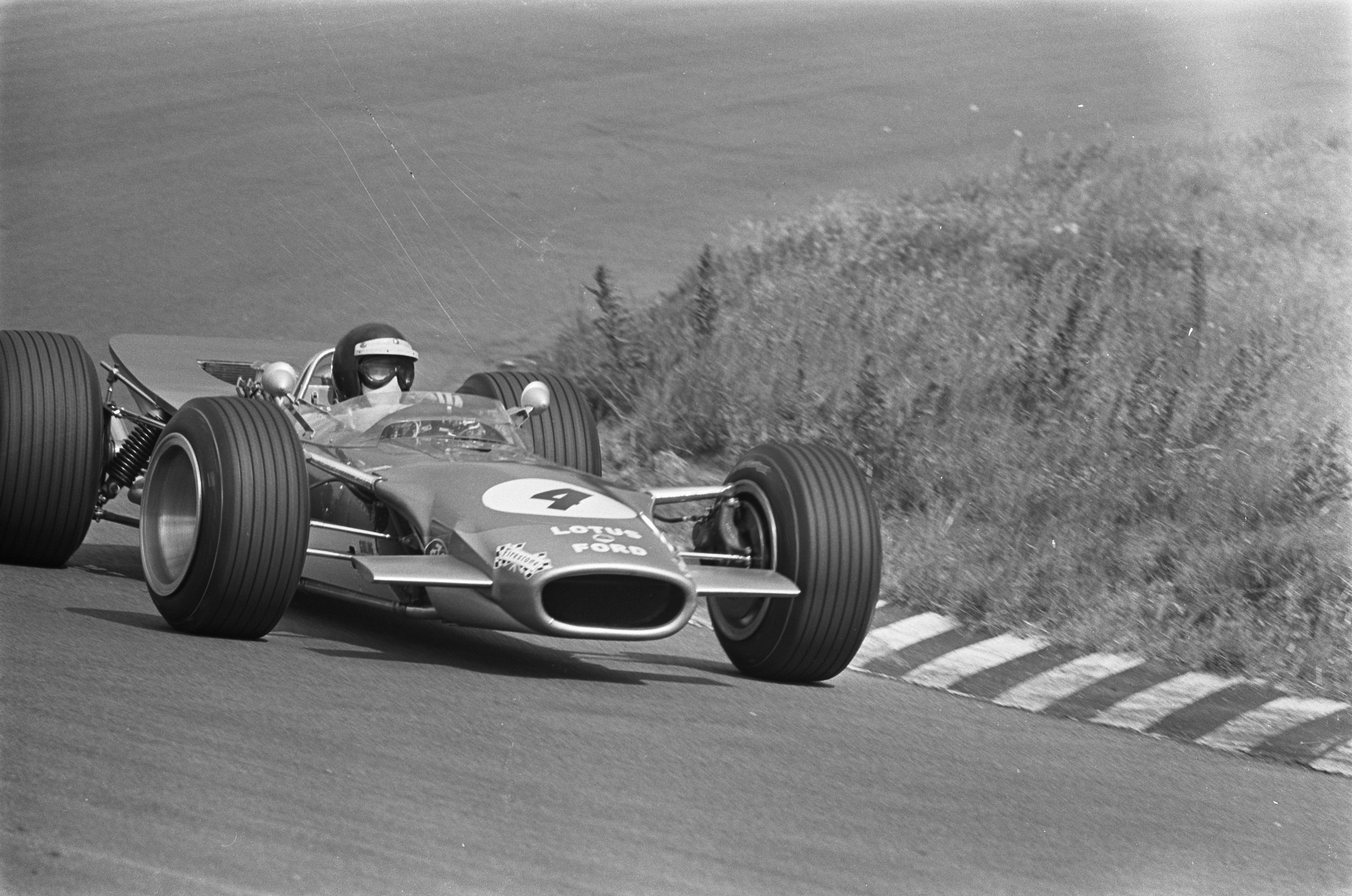 Grand Prix 68 Zandvoort . Nummers 12.14 Dennis Hulme , nummer 13 Jackie Oliver.